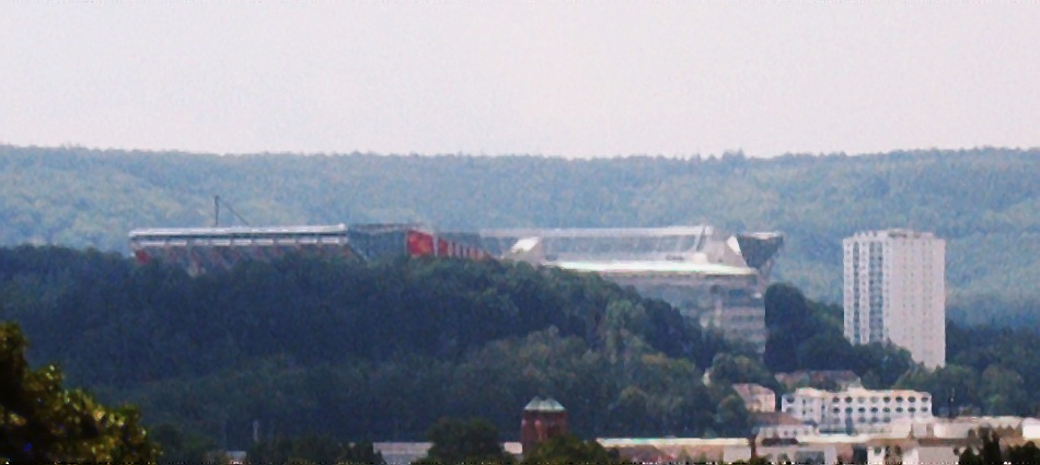 Fritz-Walter-Stadion